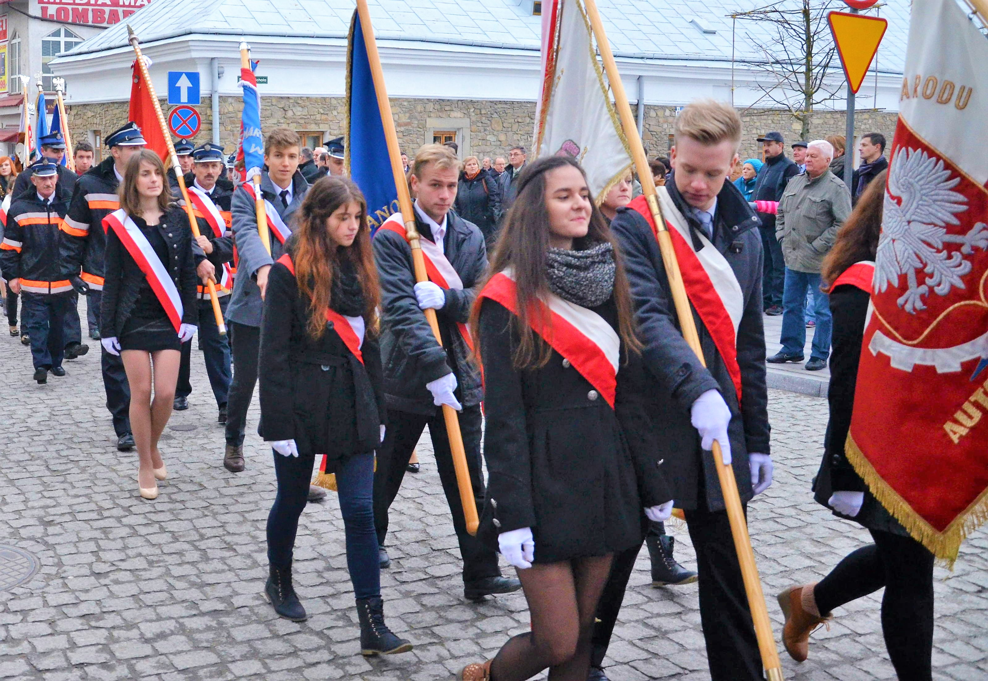 Marsch der Unabhängigkeit in Sanok